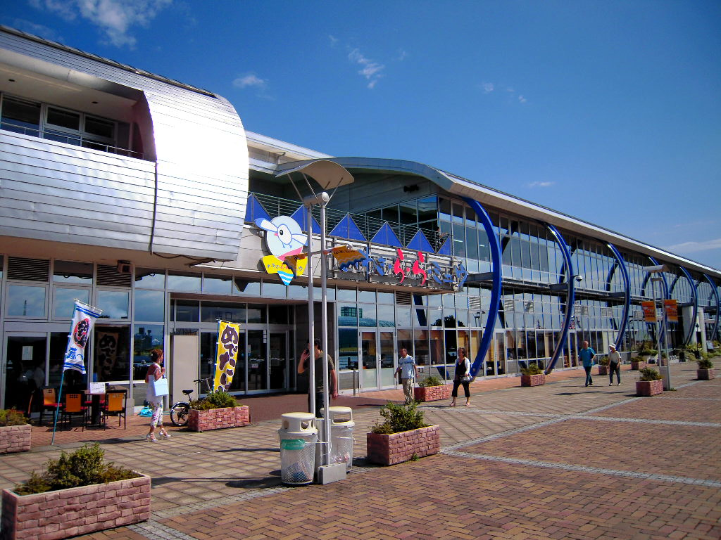 いわき・ら・ら・ミュウ西側入口